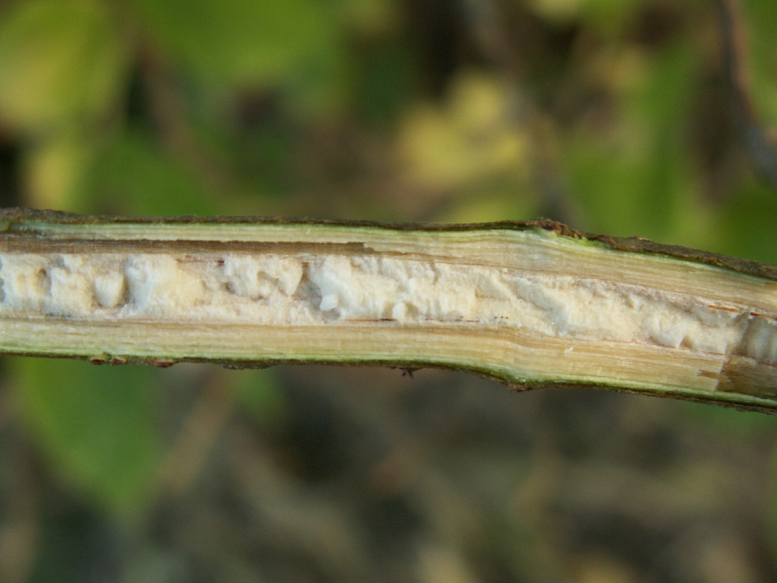 Sambucus nigra. Szczecin Dąbie, NW Poland.